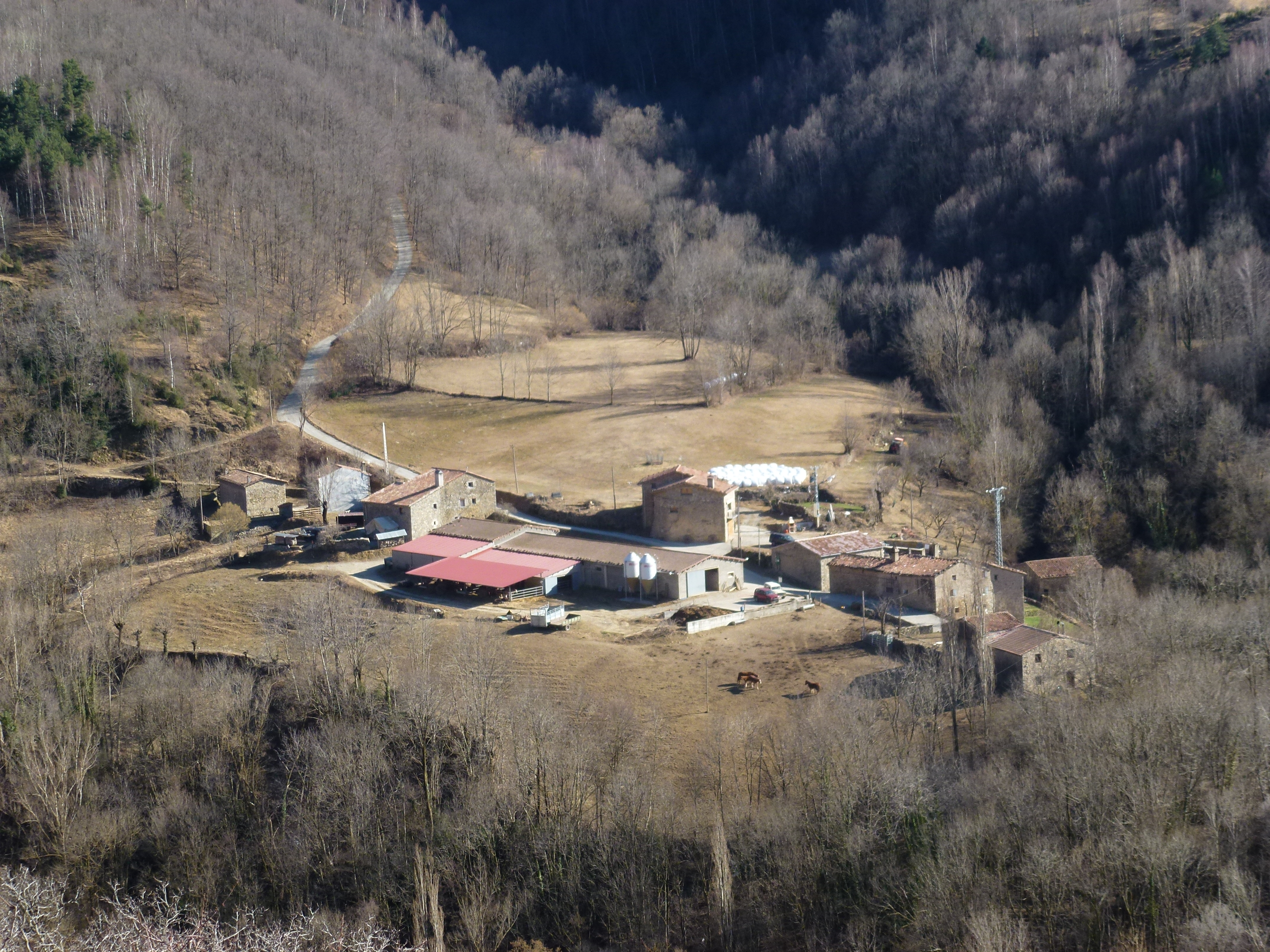 Nucli de Vilaró (Pardines)